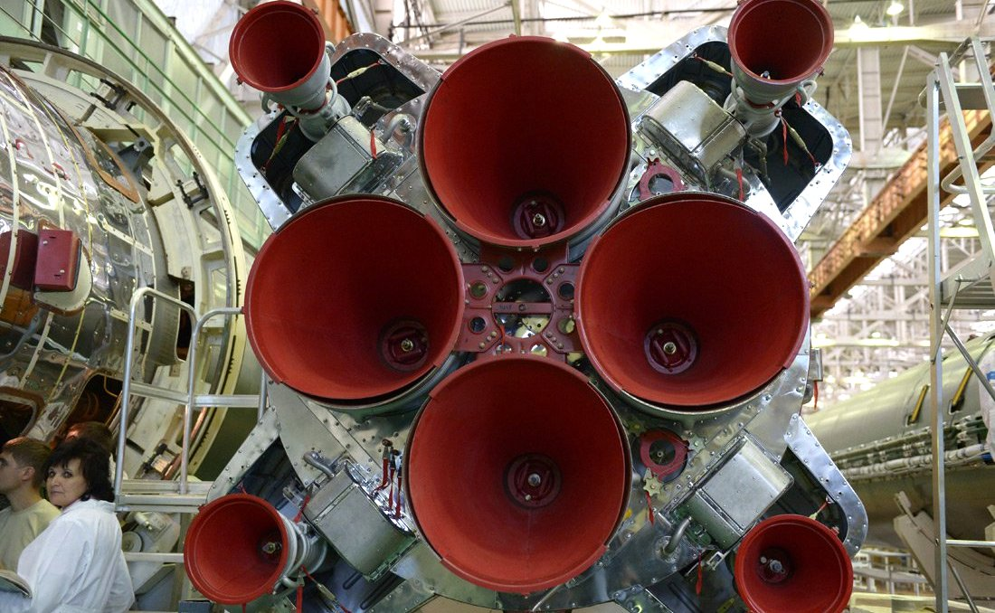 Поездка Президента России Владимира Путина в Самарскую область. Во время посещения ракетно-космического центра «Прогресс»